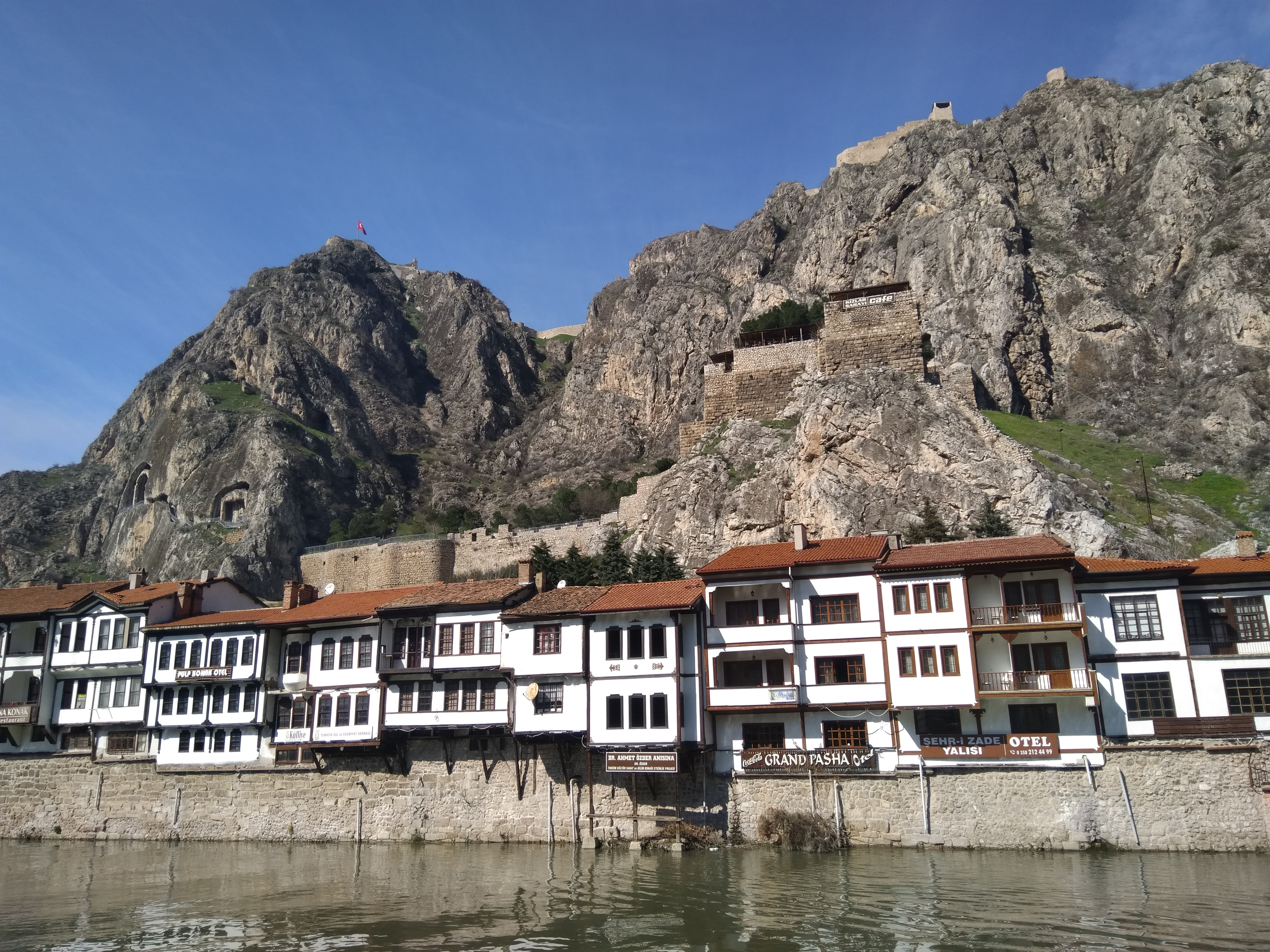 Amasya şehir merkezinden bir görünüm.